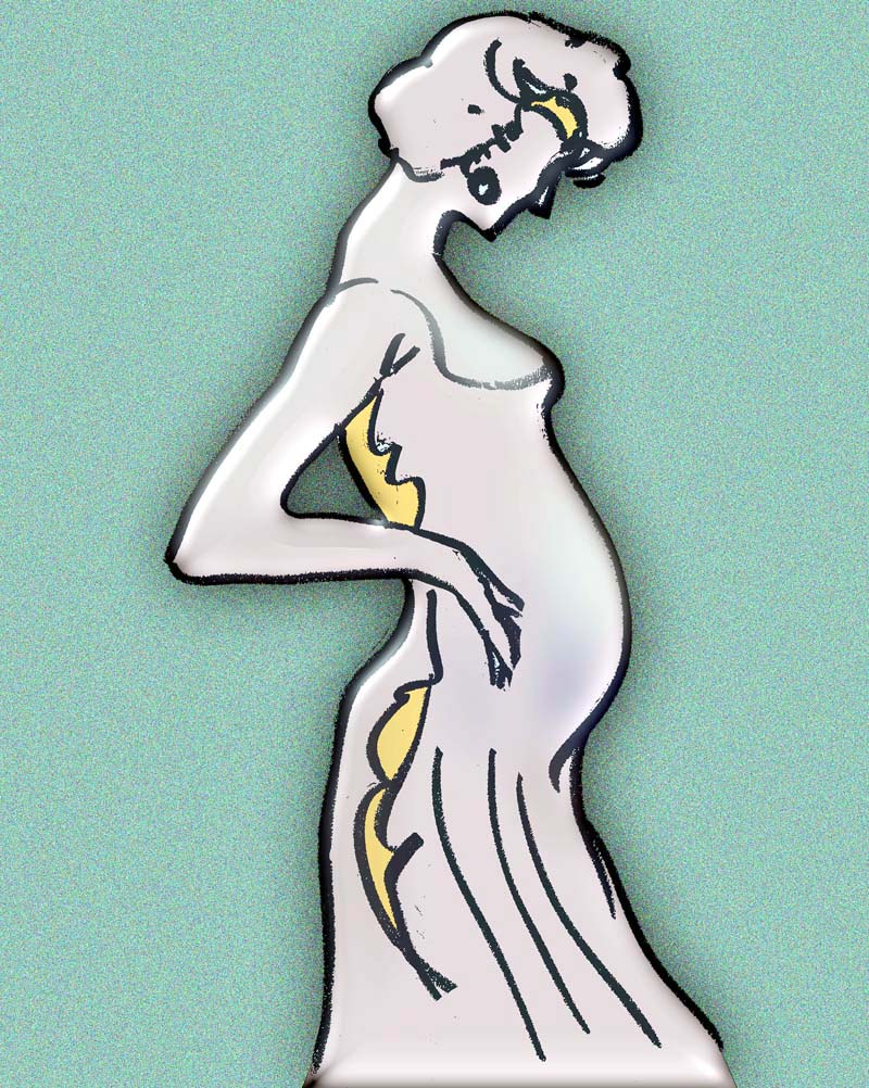 Illustration grossesse 01